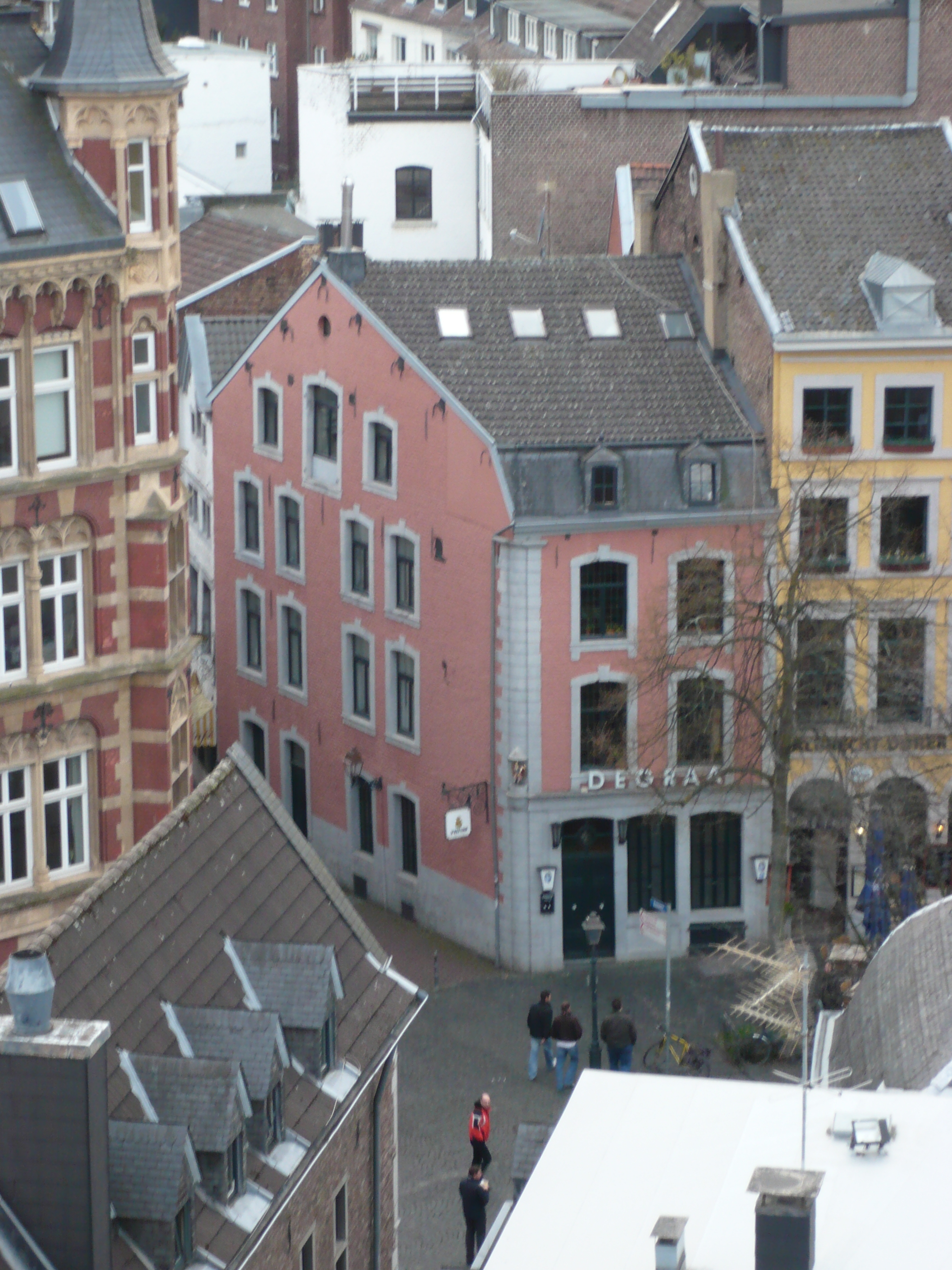 Degraa-Schenke am Fischmarkt (Fischpüddelchen) in Aachen, Blick aus einem Turmzimmer (Wallfahrtskapelle) des Aachener Doms